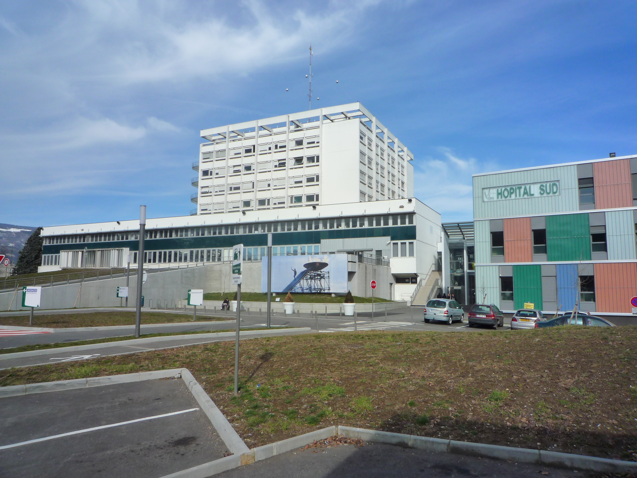 Hôpital Sud de Grenoble situé à Echirolles